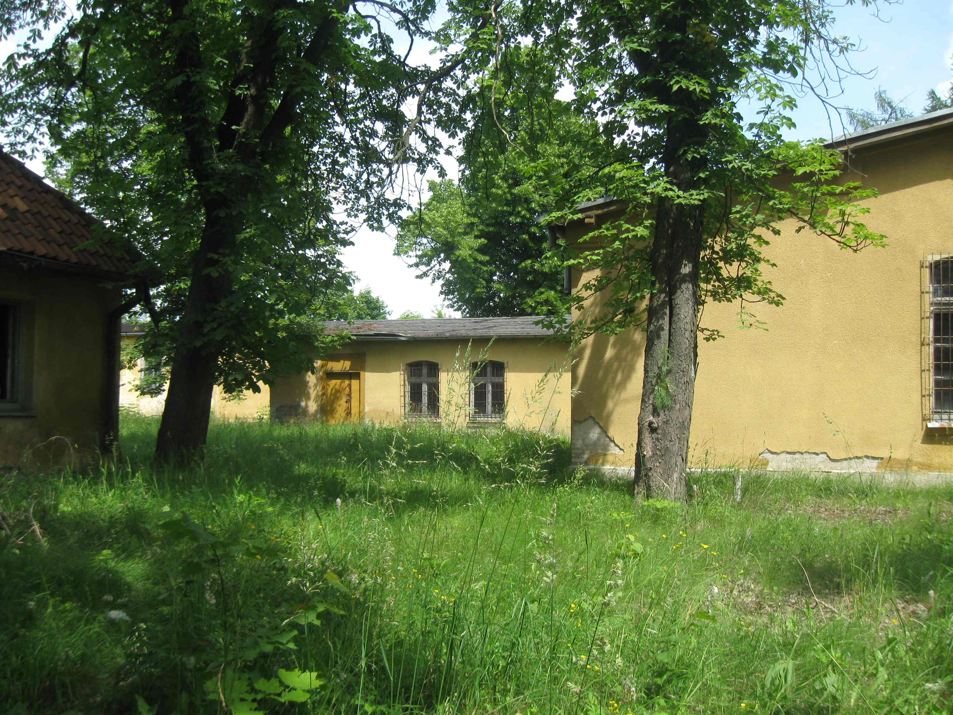 Dawne koszary Żandarmerii Wojskowej w Orzyszu